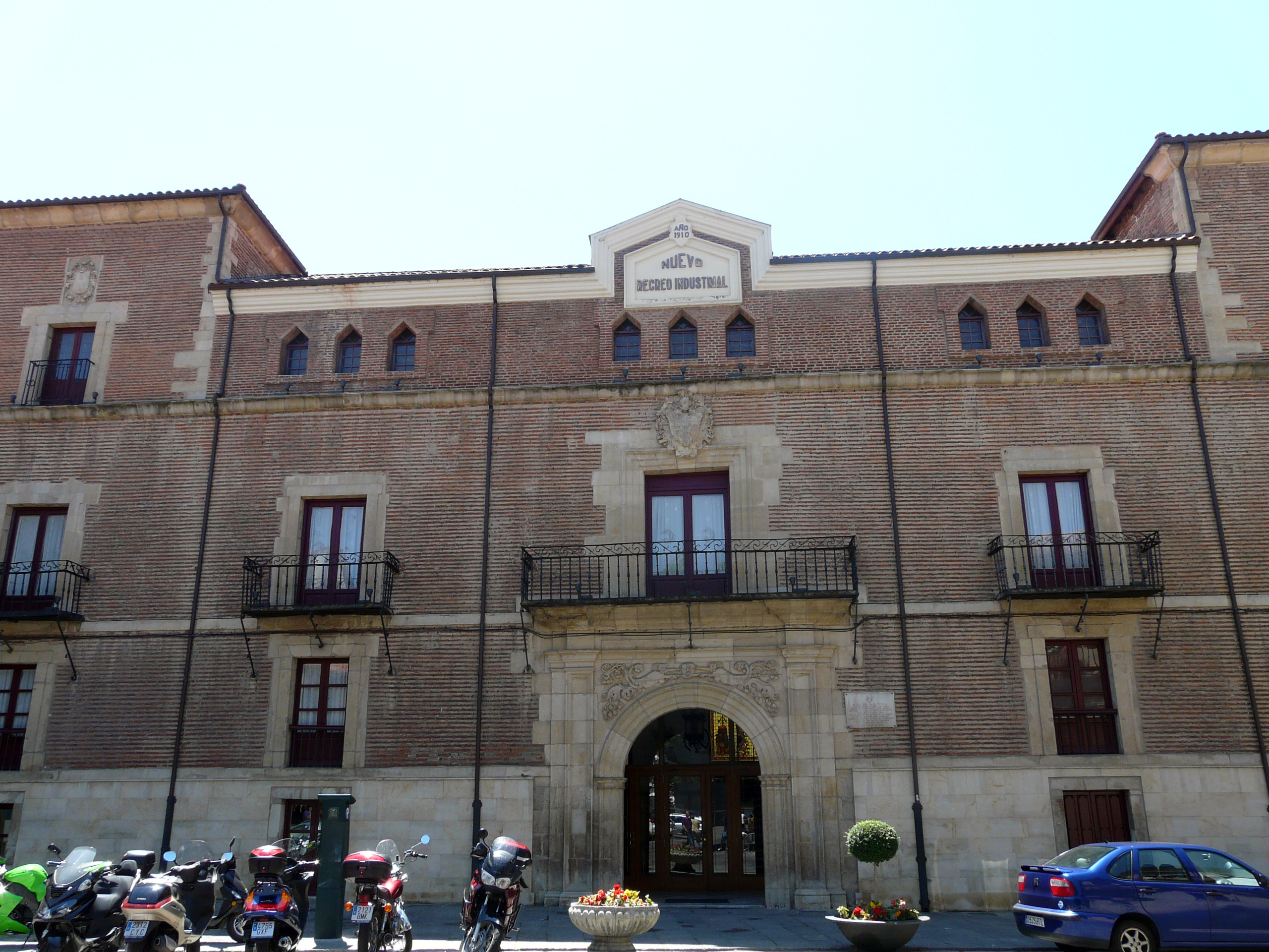 Palacio del marqués de Torreblanca, León